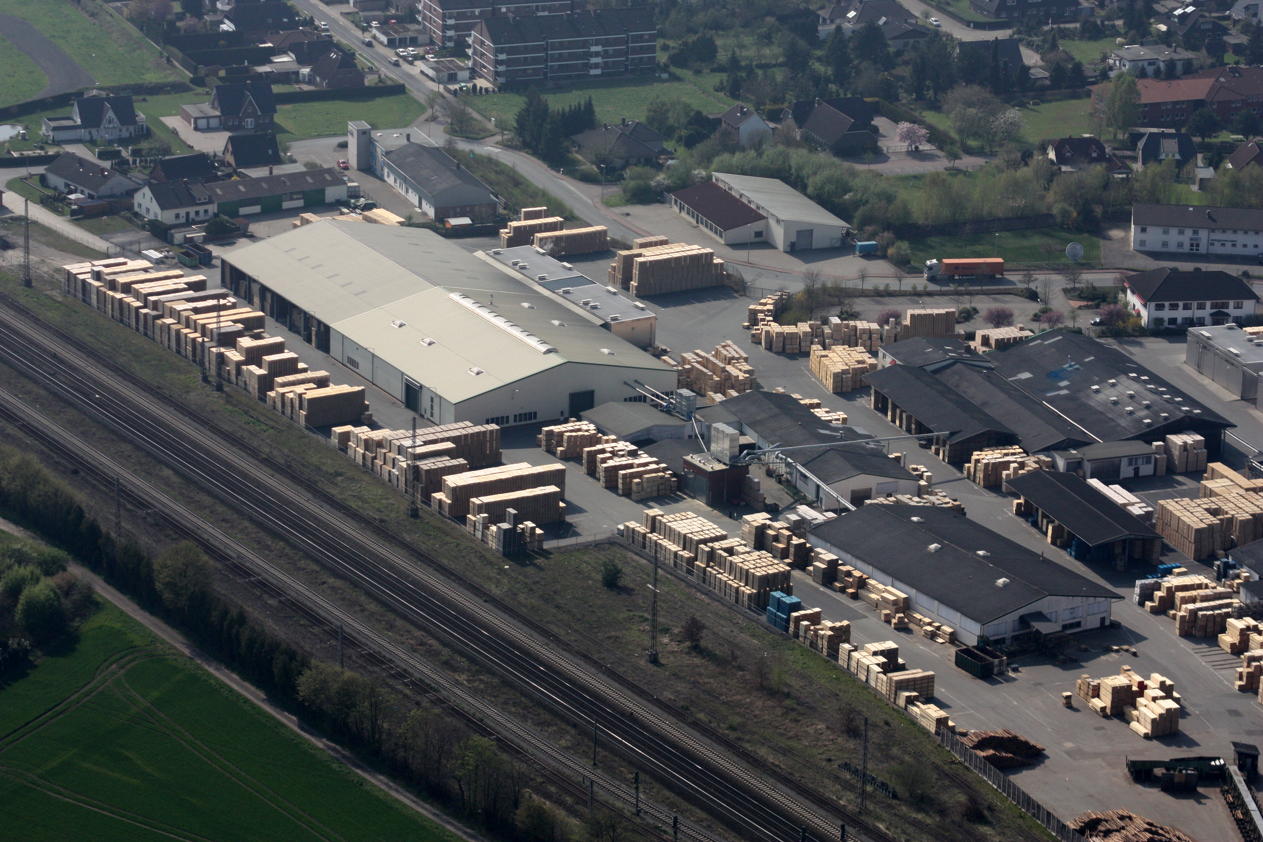 Luftbilde von Bassum